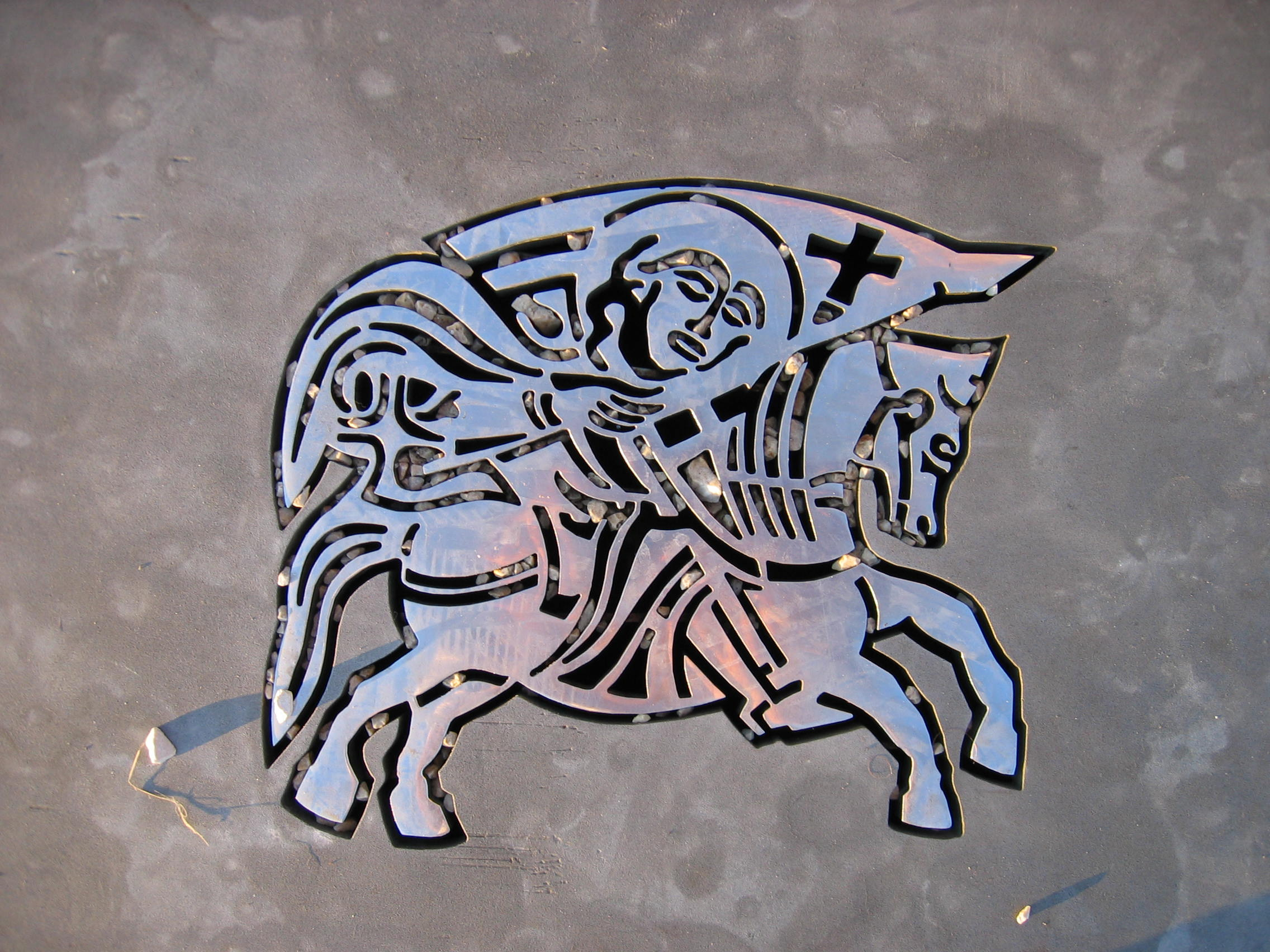 zadar